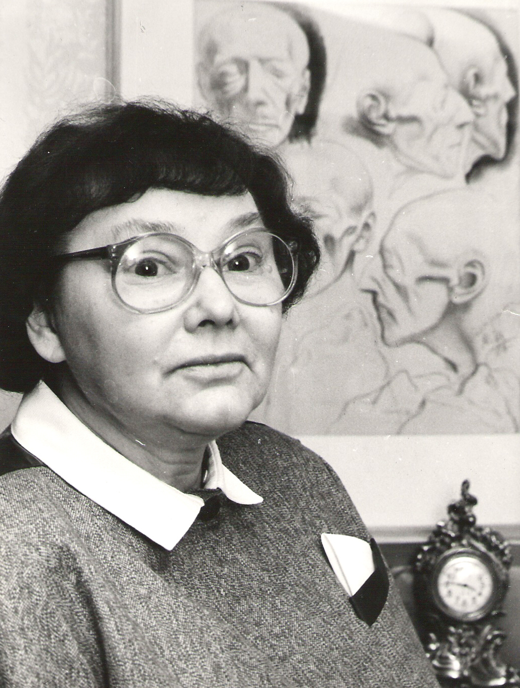 La historiadora alemana Ingrid Mittenzwei